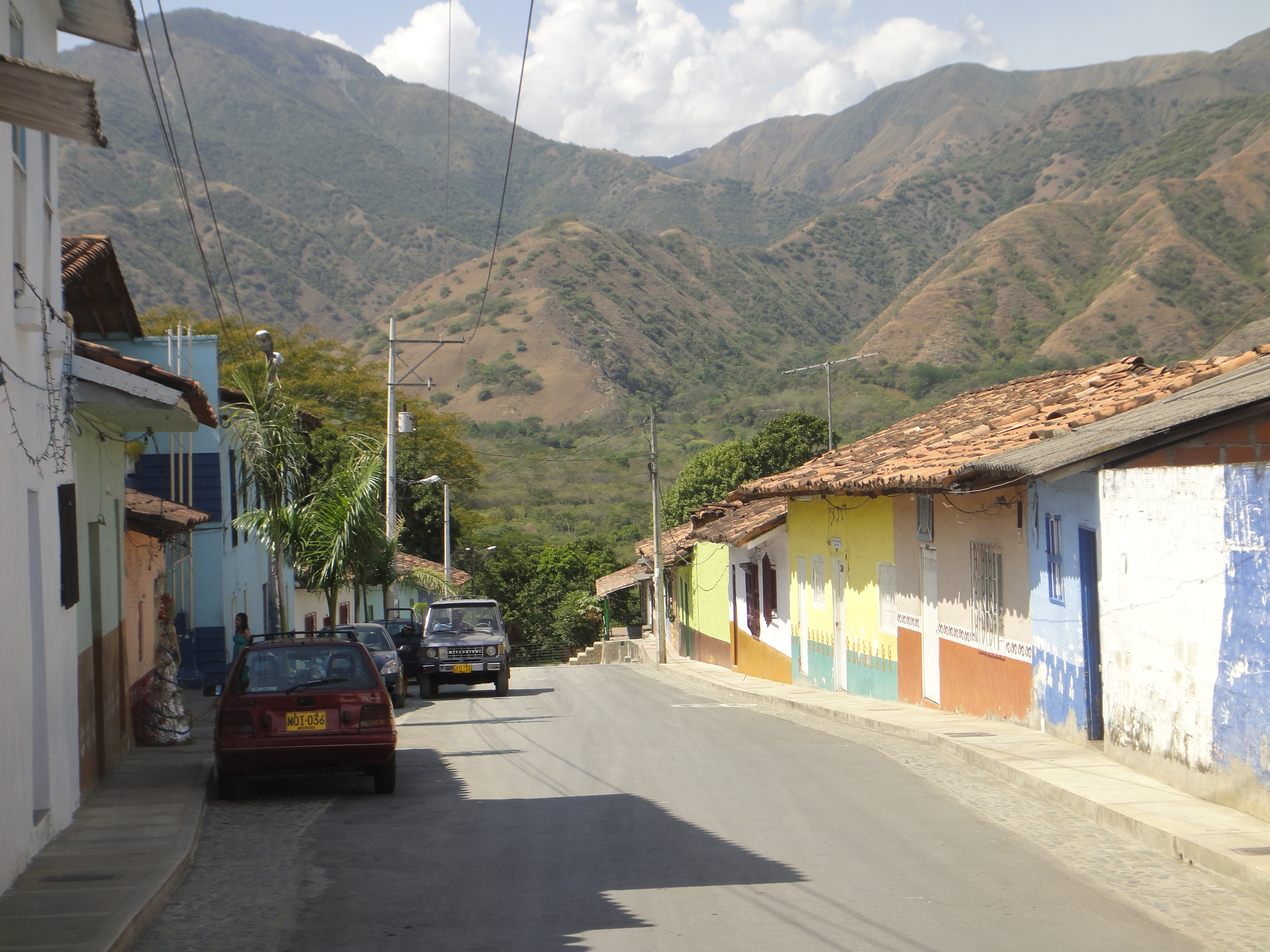 Entrada al corregimiento de Olaya, Antioquia, Colombia.